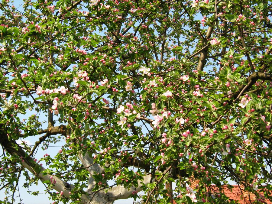 Jabłoń Sieversa (Malus sieversii (Ledeb.) Roem.) z mojego ogrodu